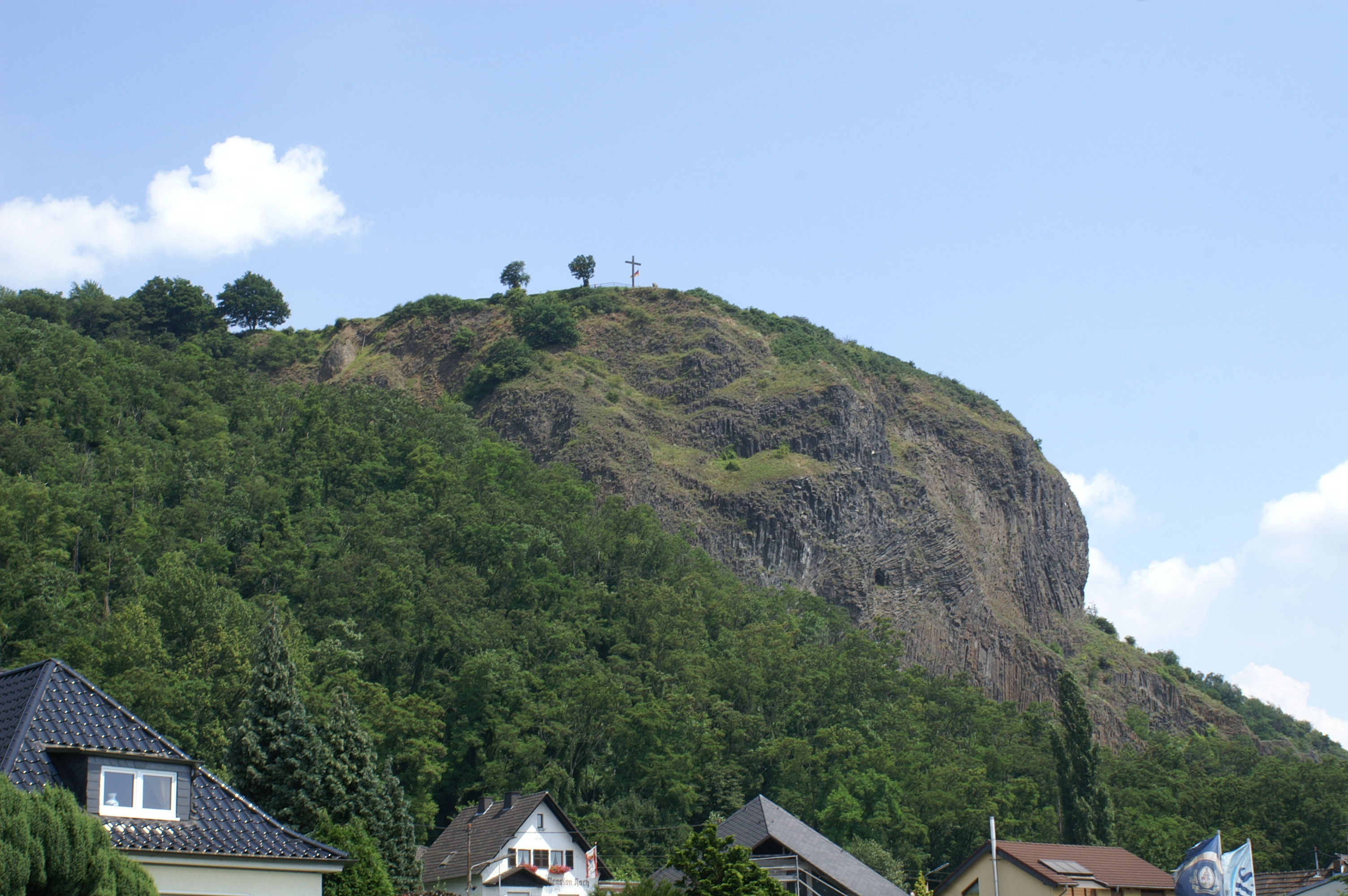 Die Erpeler Ley am Rhein, ein imposanter Basaltfels bei Erpel im Landkreis Neuwied; oberhalb der Häuser Teile des Naturschutzgebiets „Erpeler Ley“